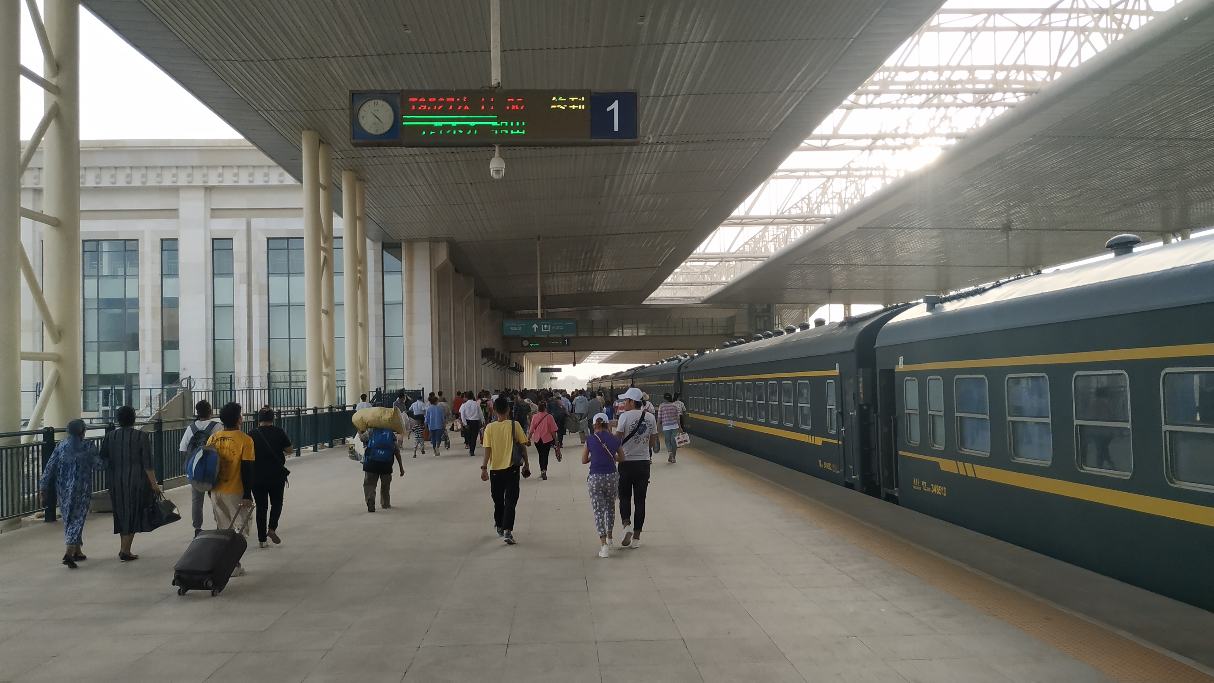 中文（中国大陆）: 和田站1站台